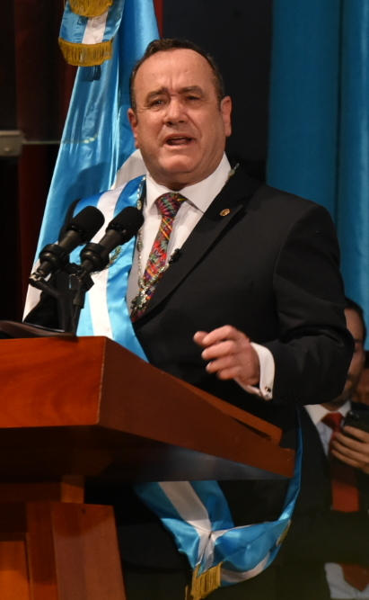 Transmisión del Mando Presidencial 2020.